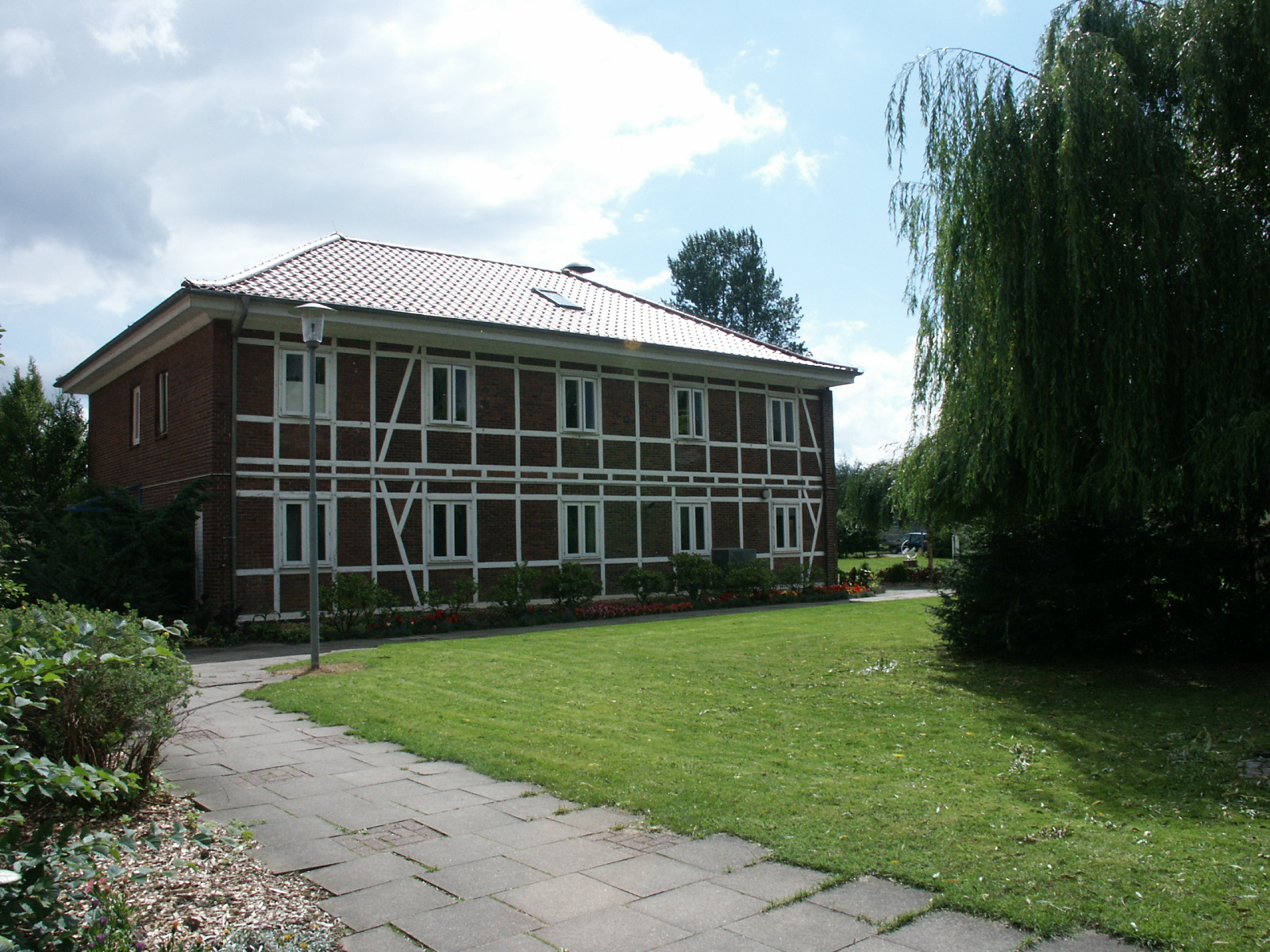 historischer Museumsbau auf Hahnöfersand bei Hamburg (Gefängnisinsel), 2007